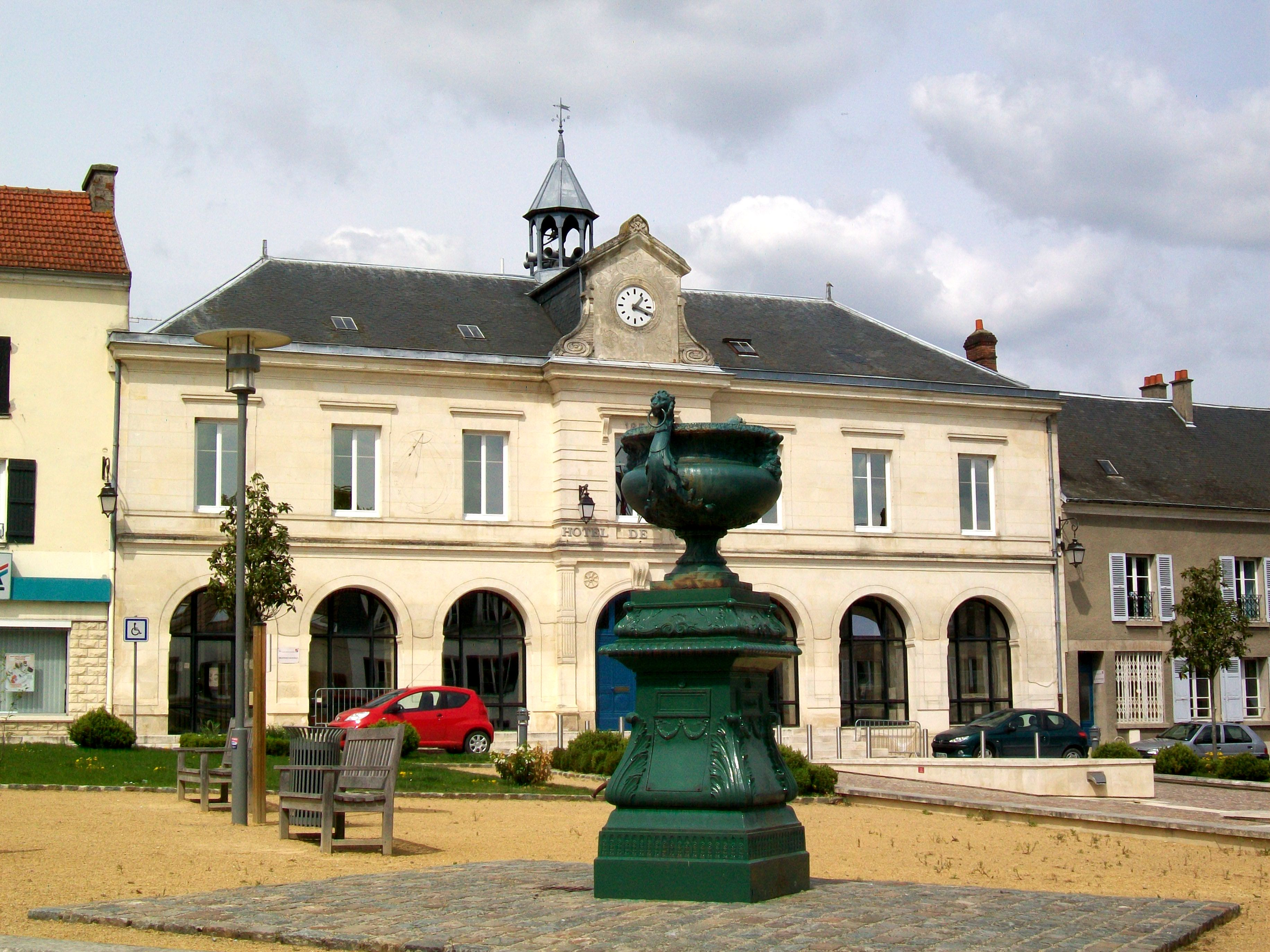 L'hôtel de ville de Nanteuil-le-Haudouin, rue Gambetta.